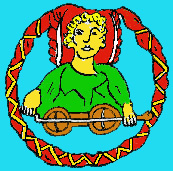 Dibujo de Symphonia.